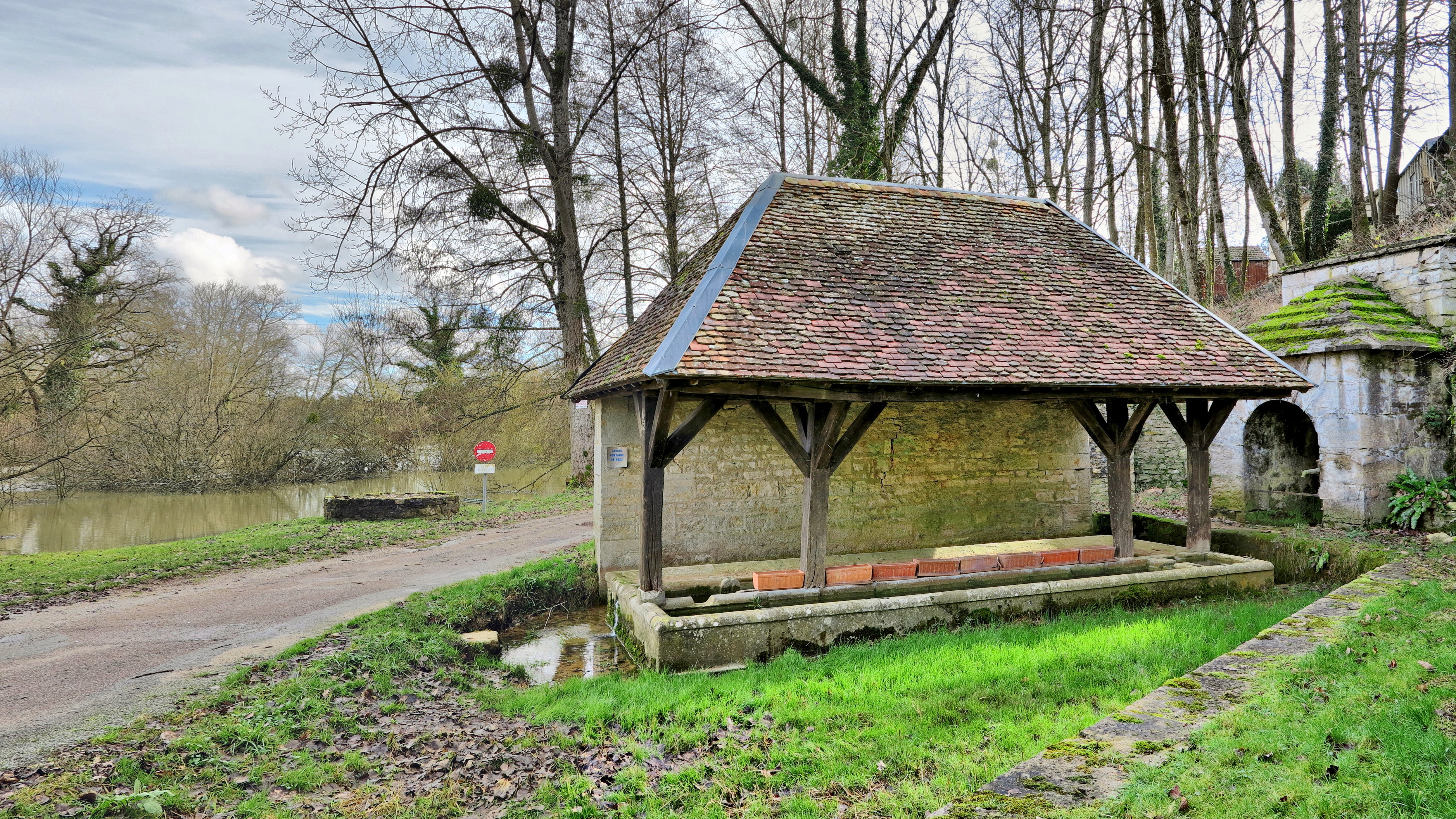 Le lavoir-abreuvoir au bord de l'Ognon